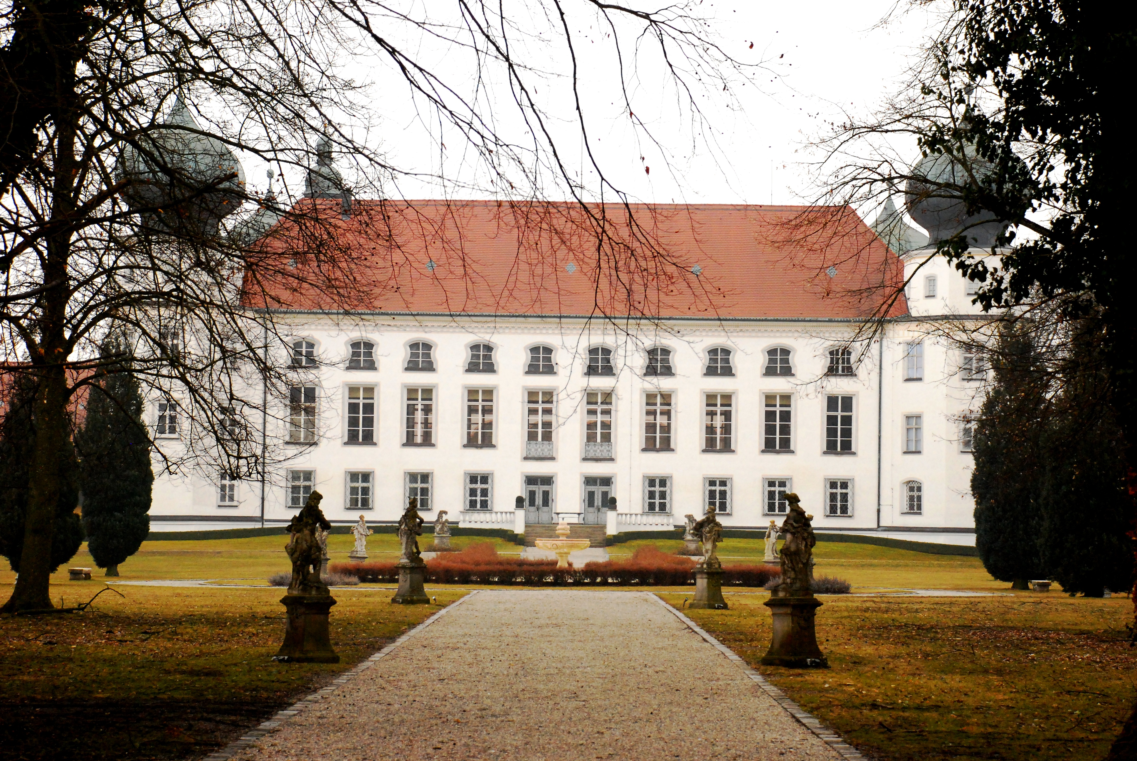 Schloss Tüßling in Tüßling, Landkreis Altötting, Regierungsbezirk Oberbayern, Bayern. Als Baudenkmal unter Aktennummer D-1-71-133-6 in der Bayerischen Denkmalliste aufgeführt.